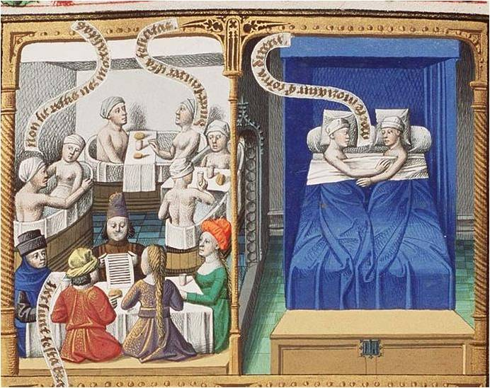 Llit